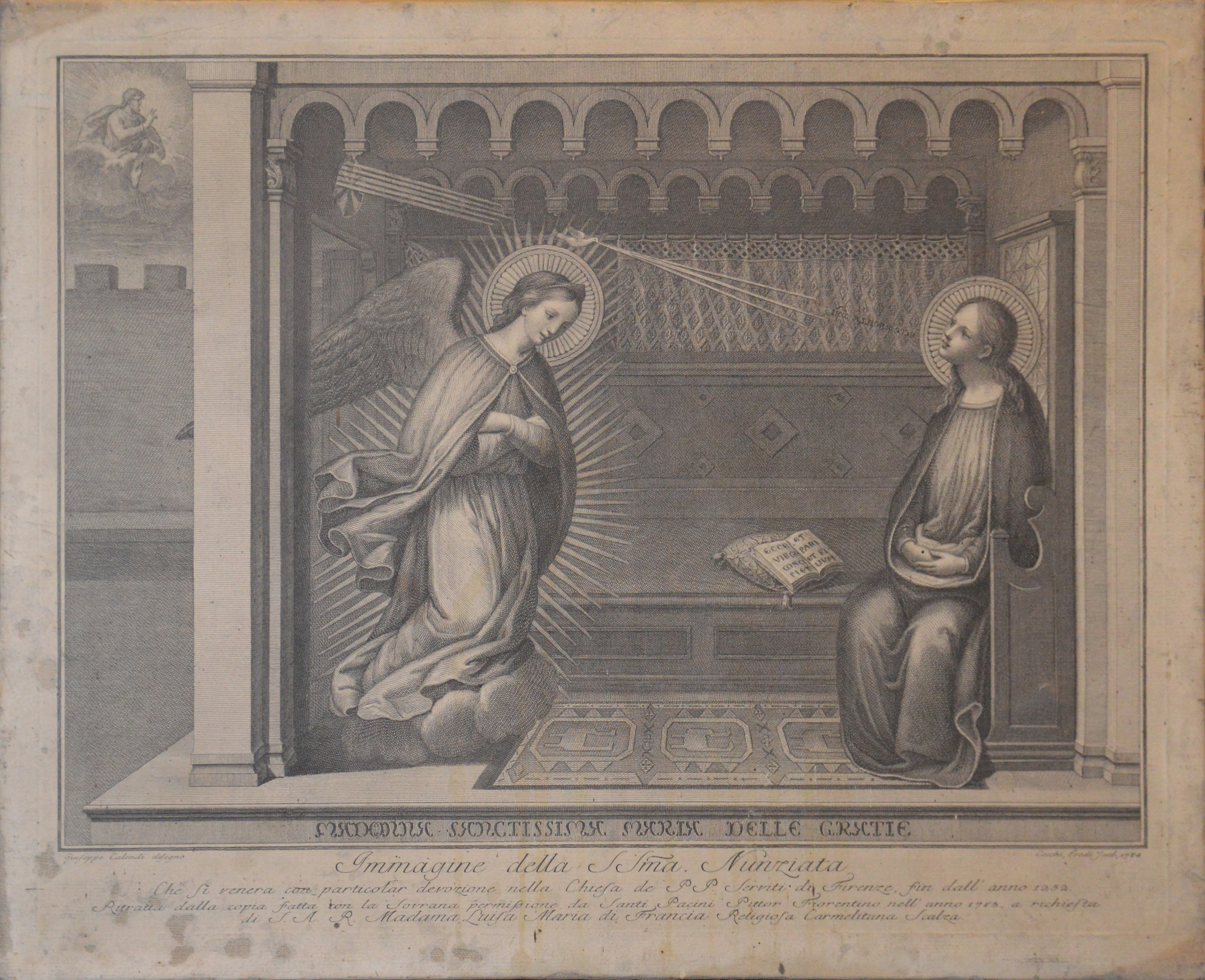 Stampa degli incisori Cecchi-Eredi raffigurante l'affresco della ss.ma Annunziata in Firenze